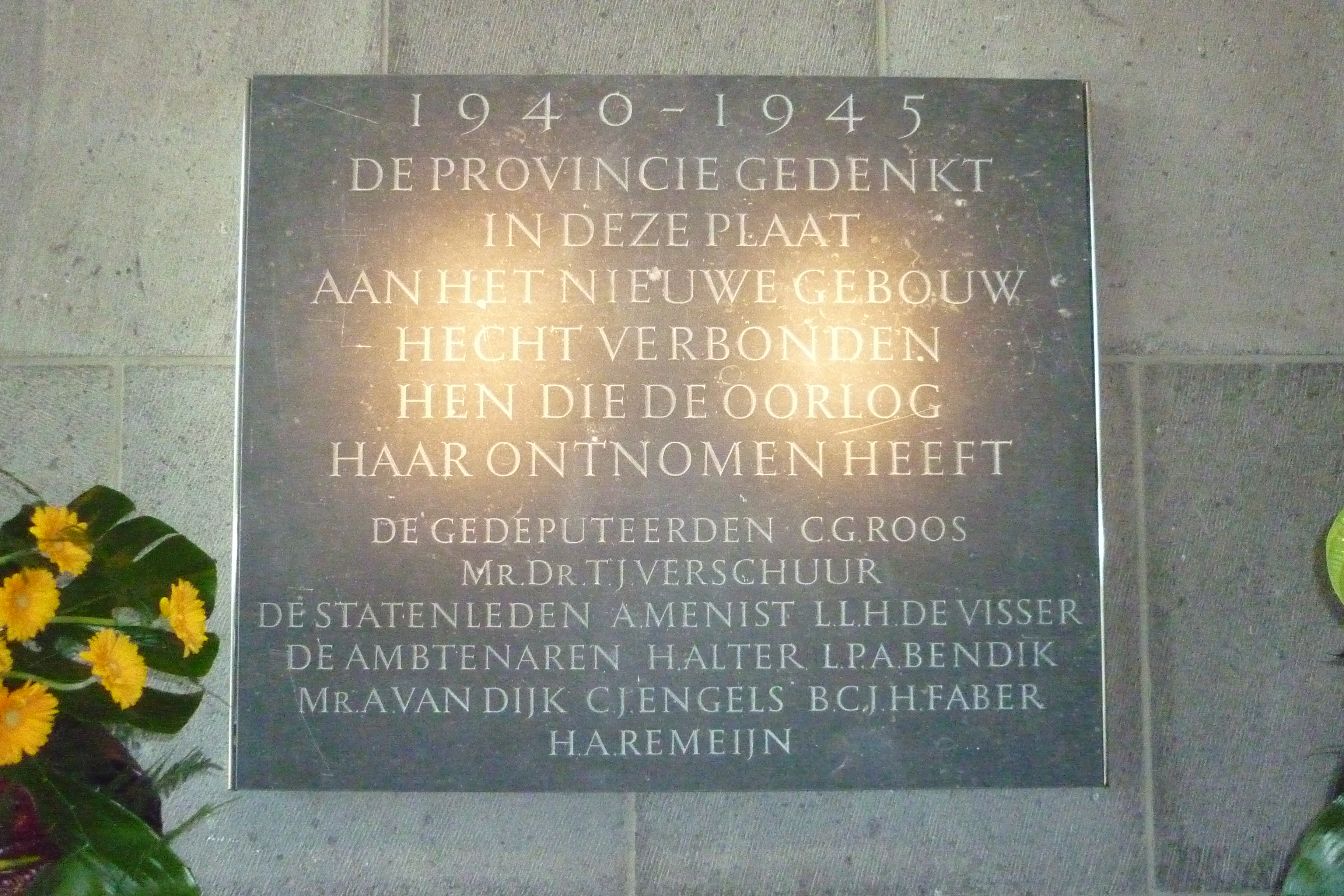 Plaquette in het Provinciehuis in Den Haag ter herinnering aan hun oorlogsslachtoffers